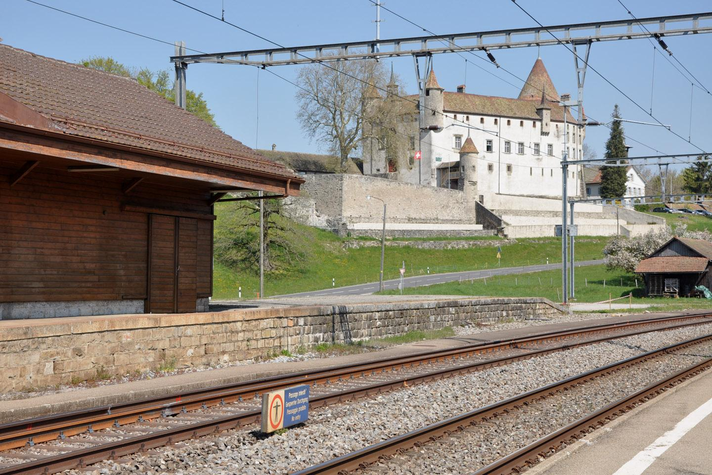 Schloss Oron, französisch Château d'Oron, in Oron-le-Châtel in der Schweiz im April 2011. Im Vordergrund links der Güterschuppen des Bahnhof Oron.